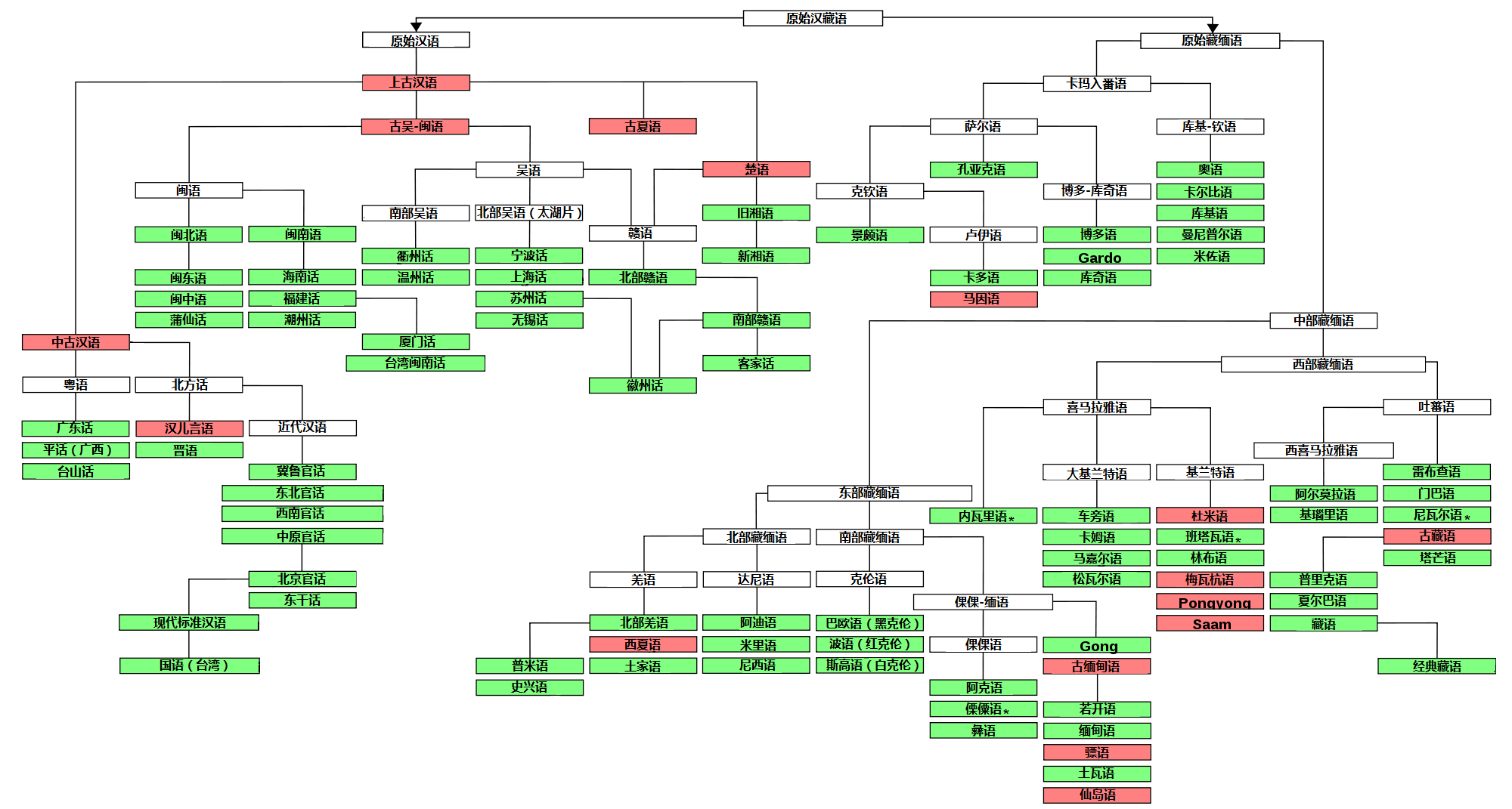 汉藏语系语言。